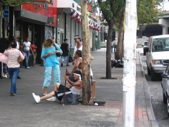 Hunts Point residents